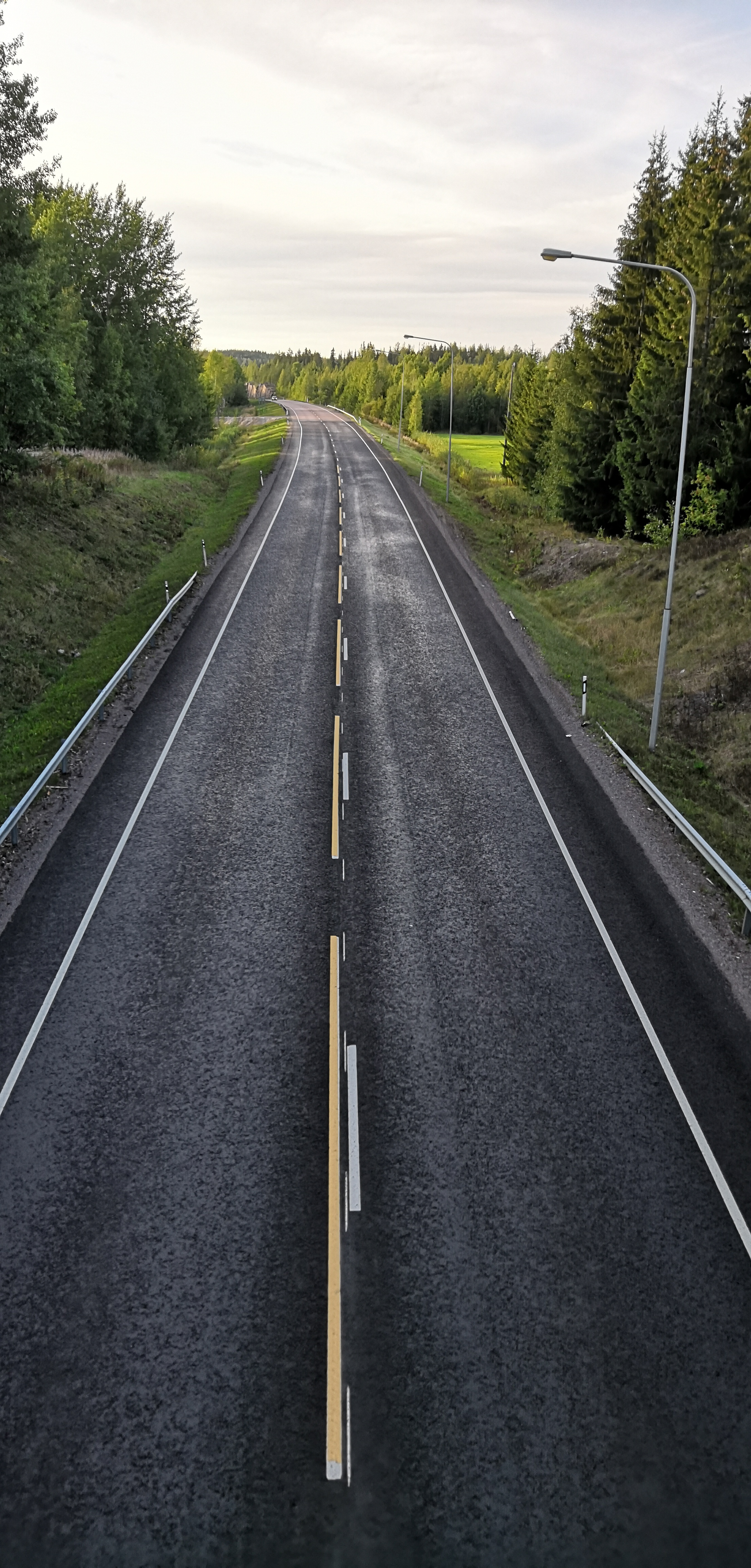 Kantatie 46 (Heinolantie) Valkealan Kuninkaankylässä